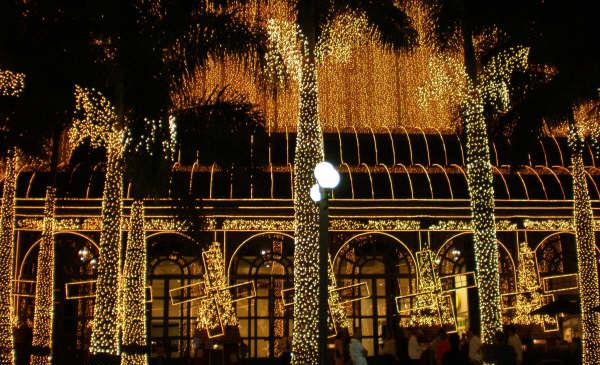 Shopping Higienopolis at night, São Paulo, Brazil